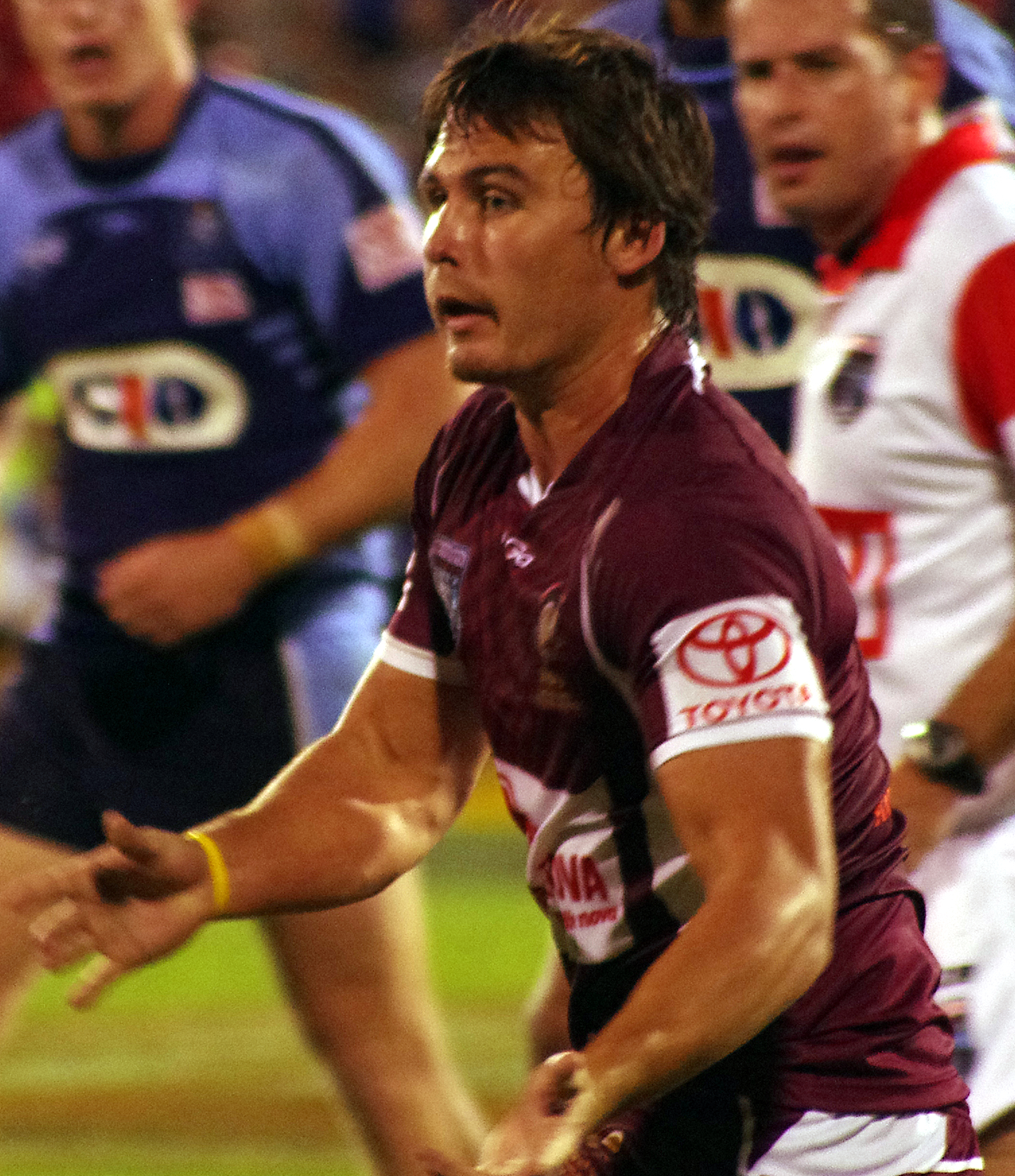 Queensland U20